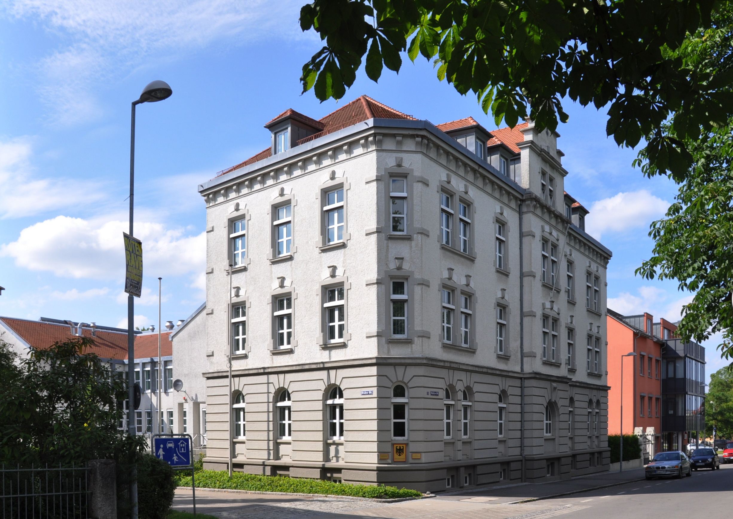 Ravensburg, Kreiswehrersatzamt, Schützenstraße 31